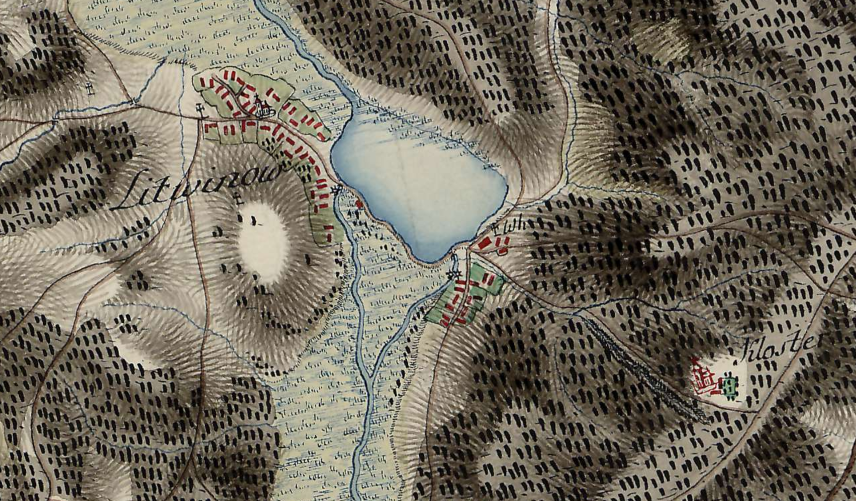 Xviii